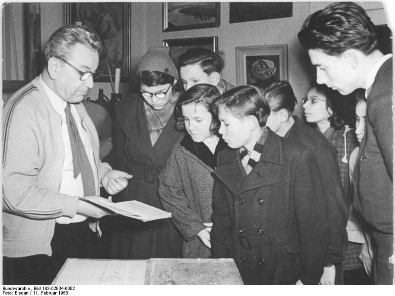 Magdeburg, Jugendstunde mit Georg Speck Zentralbild Biscan Vgt-Noa 11.2.1958 Schüler besuchen Maler-Atelier Eine Gruppe von Schülern der Leibniz-Grundschule in Magdeburg, die an der Jugendweihe teilnehmen, besuchte in Begleitung ihrer Lehrers Dieter Schöneberg den Maler Georg Andreas Speck in seinem Atelier. Der Künstler gab den Jungen und Mädchen einen Überblick über sein Schaffen und erklärte ihnen, wie seine Werke entstehen. UBz: Georg Andreas Speck zeigt den Schülern sein Skizzenbuch, das er immer bei sich trägt.